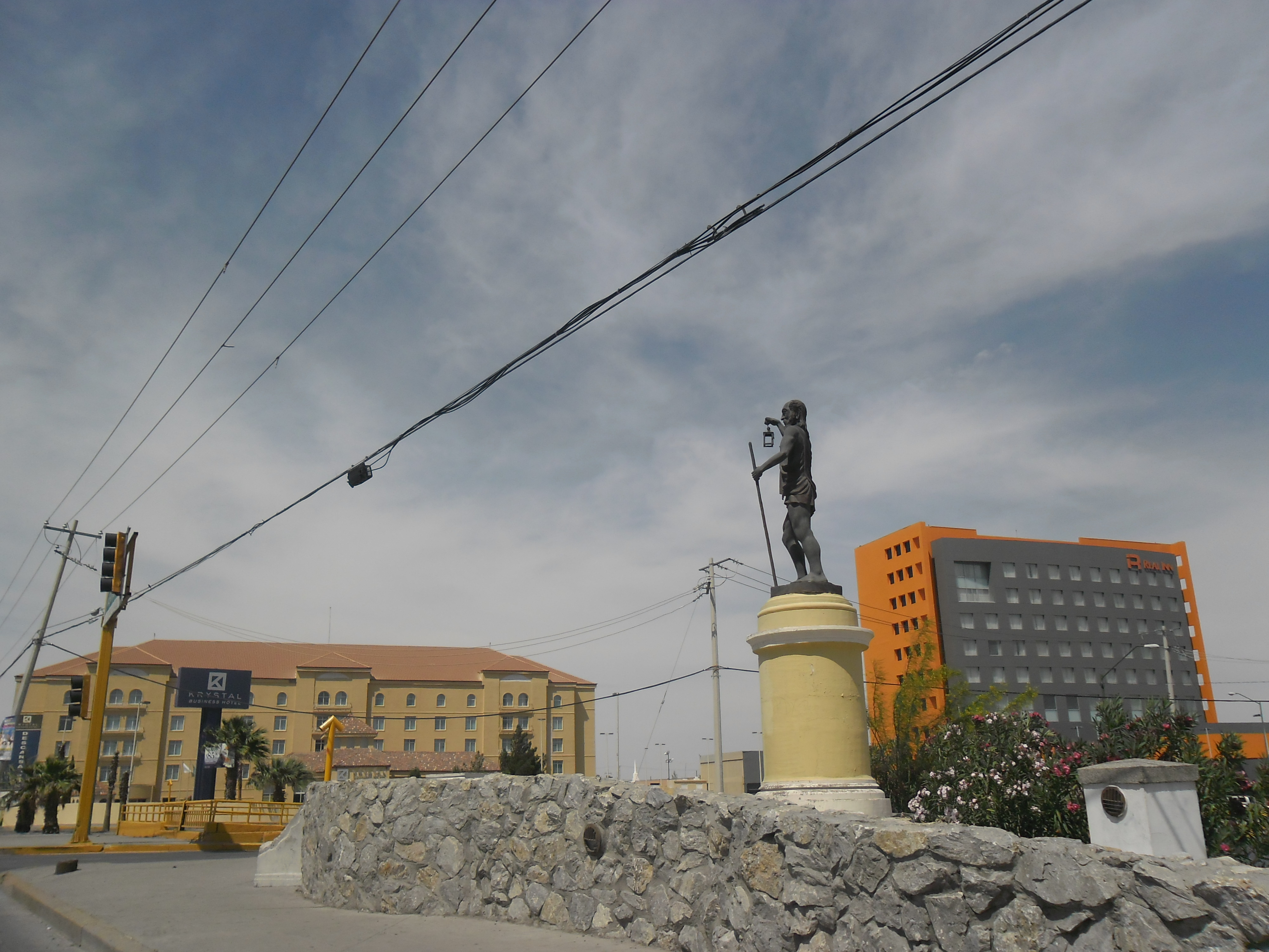 real inn y krystal hotel